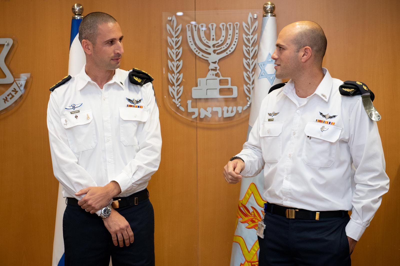 טקס החלפת רל"ש הרמטכ"ל, יולי 2019, משמאל הרל"ש היוצא אמיר פרחי, מימין הרל"ש הנכנס אייל.